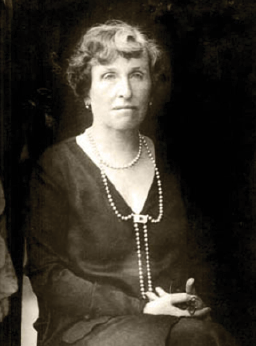 Isabella Andrews, fundadora do Colégio Andrews.